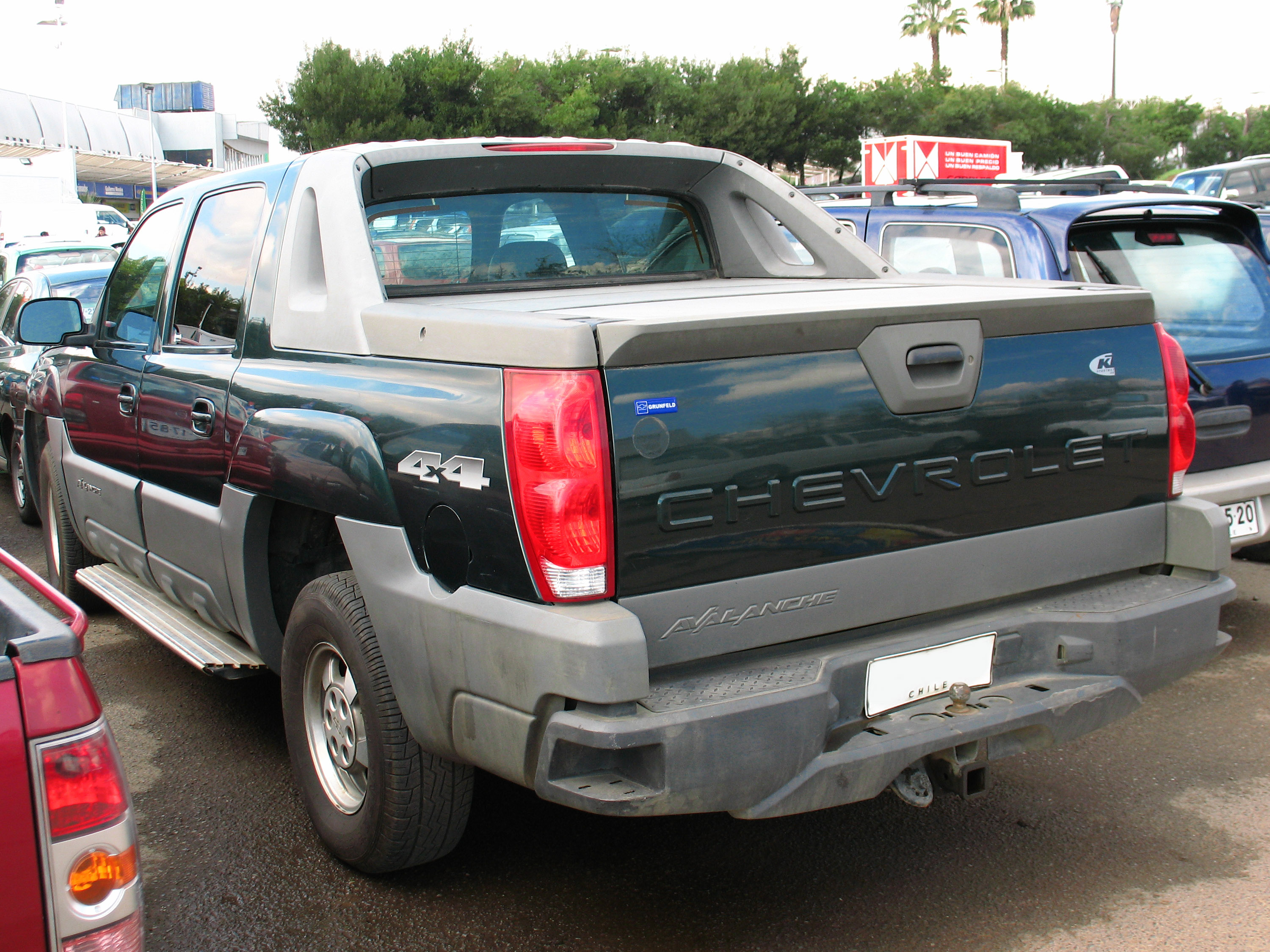 Chevrolet Avalanche 4x4 2004